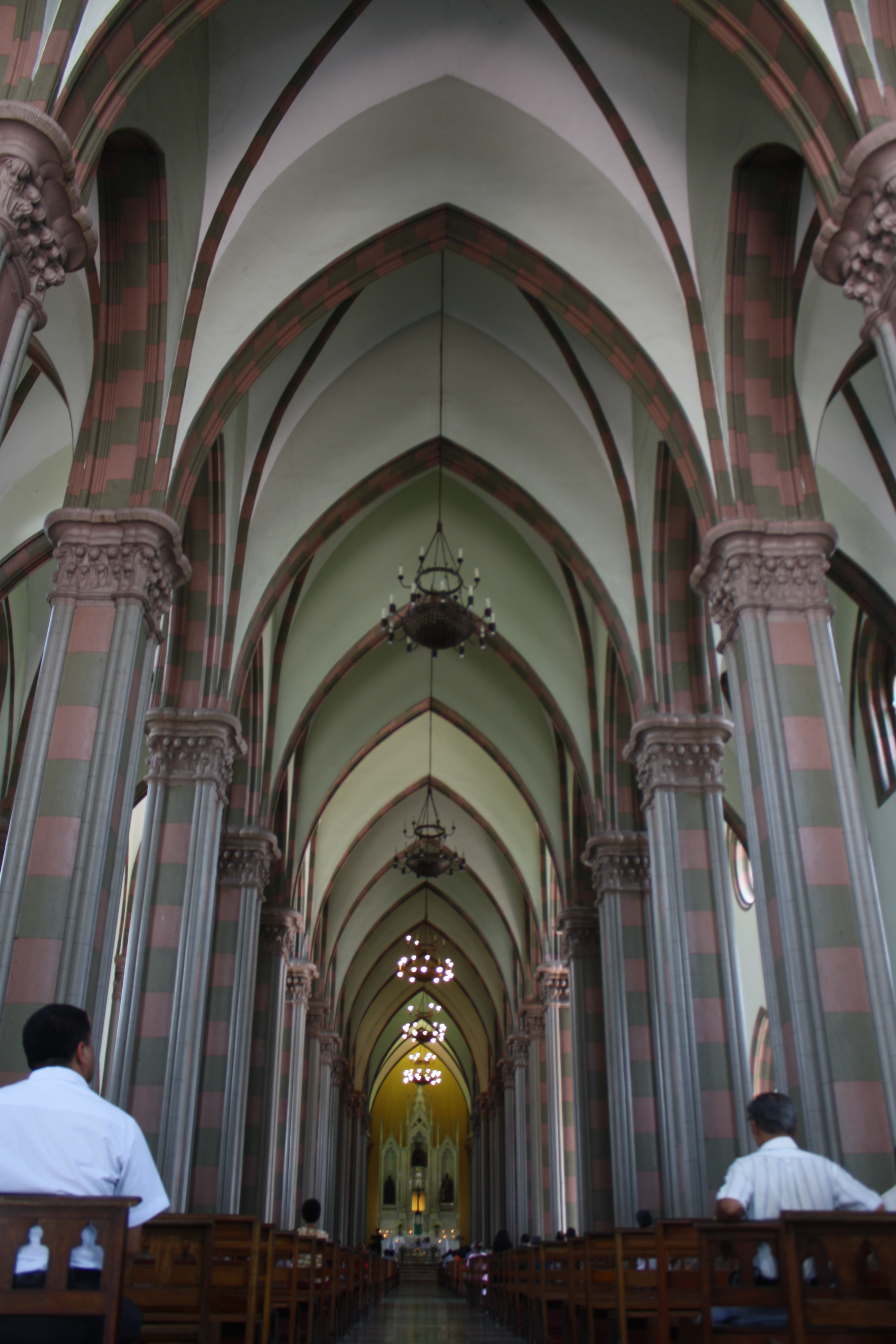 Un momumento maravillo desde su estructura hasta el misticismo que la envuelve, la bella catedral de Santa Ana